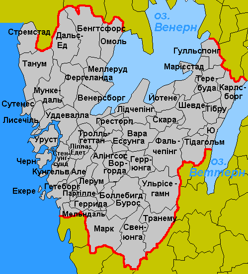 Карта адміністративного поділу лену Вестра Йоталанд у Швеції. Карту створено на основі карти File:Västra Götaland County.png.